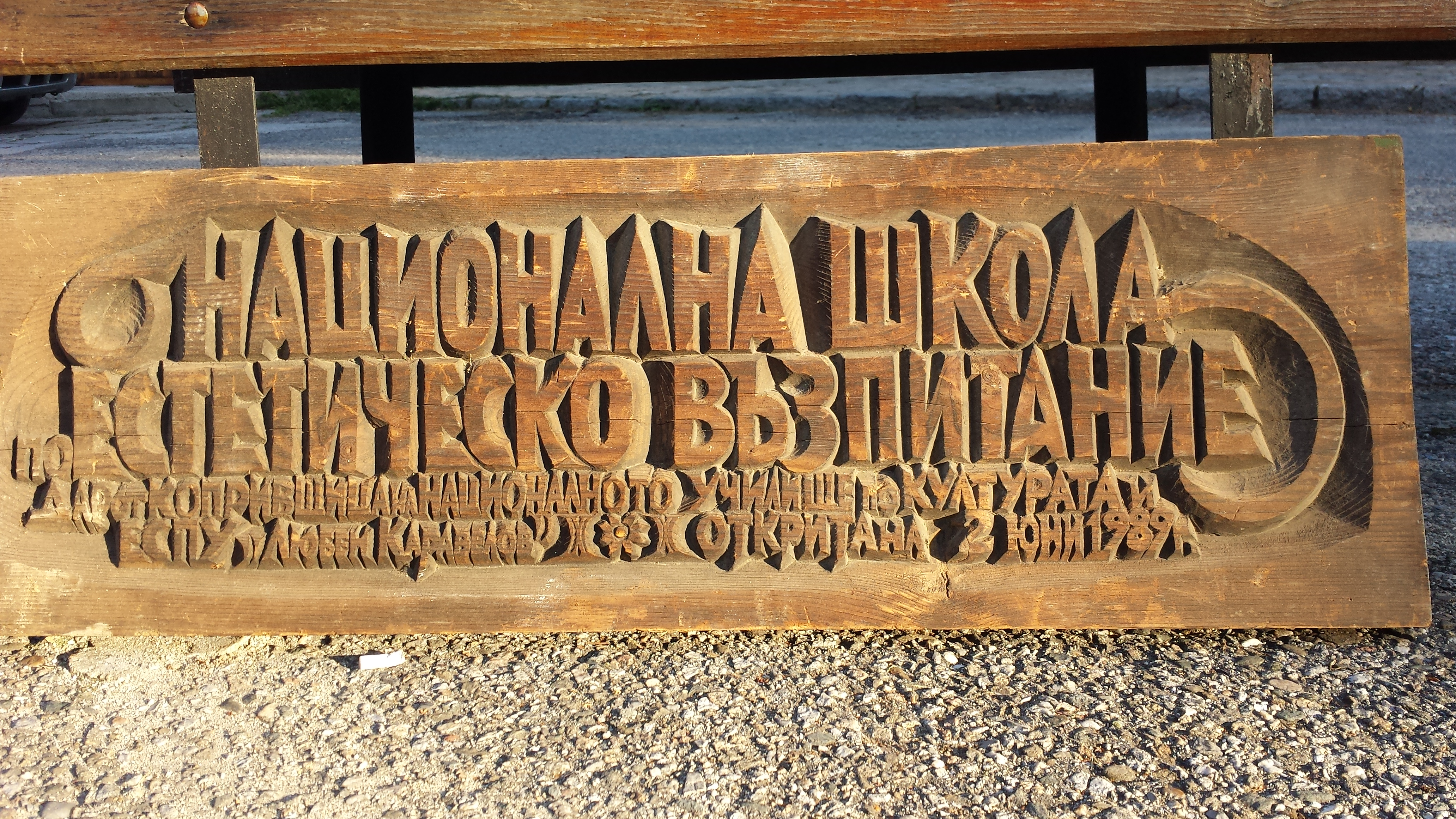 Днес Жив музей